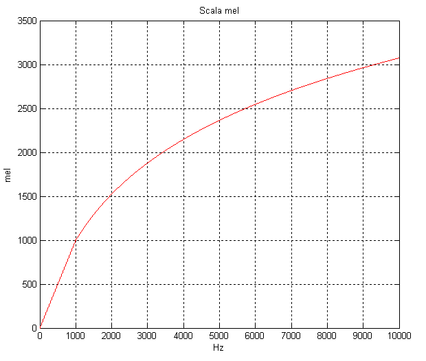 mel scale plot